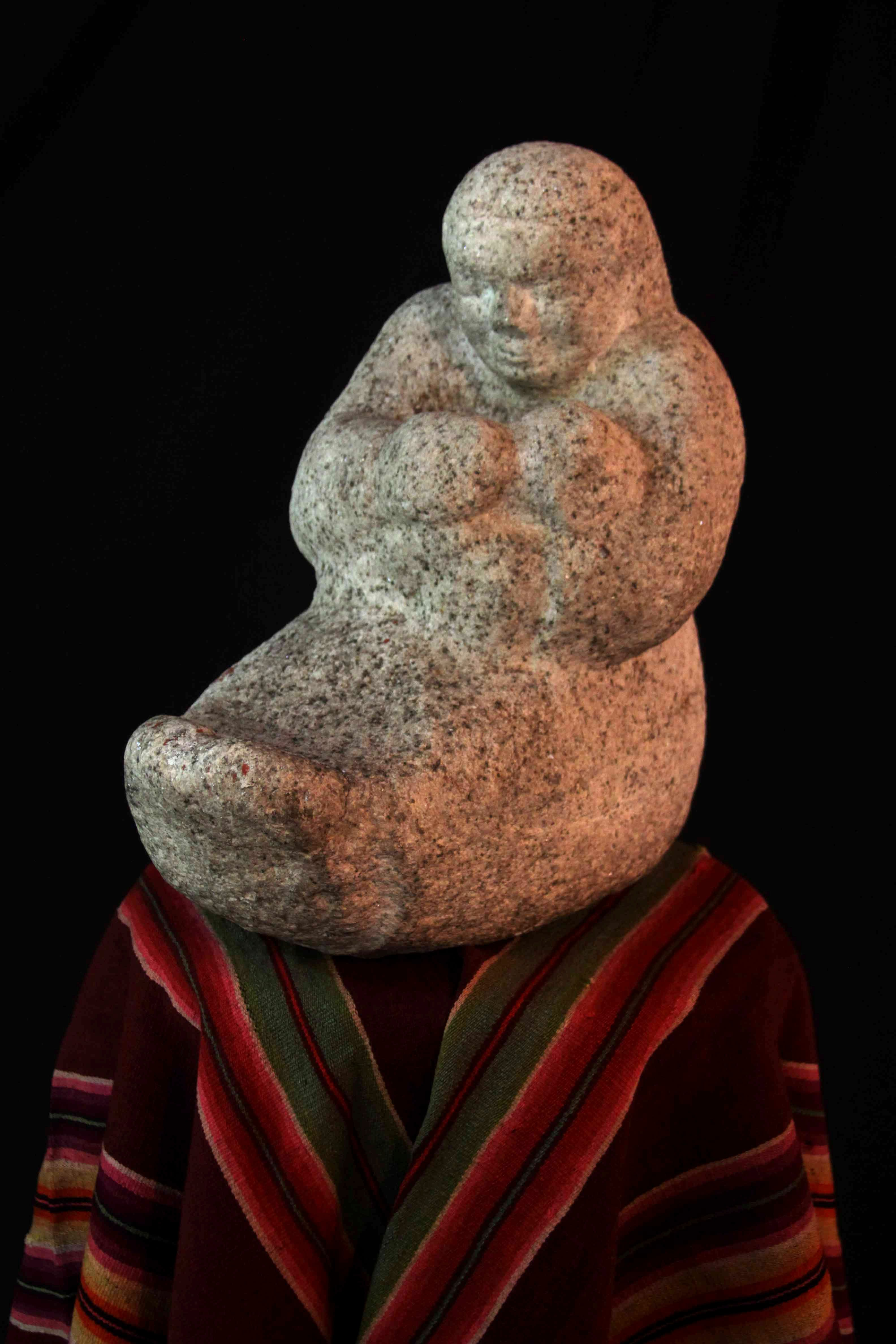 Escultor: Omar Duranböger (1962) Talla directa Granito de Canto Rodado La Paz, Bolivia Premio Estímulo 5to. Salón Nacional de Bellas Artes Fotografía: Ariel Duranboger